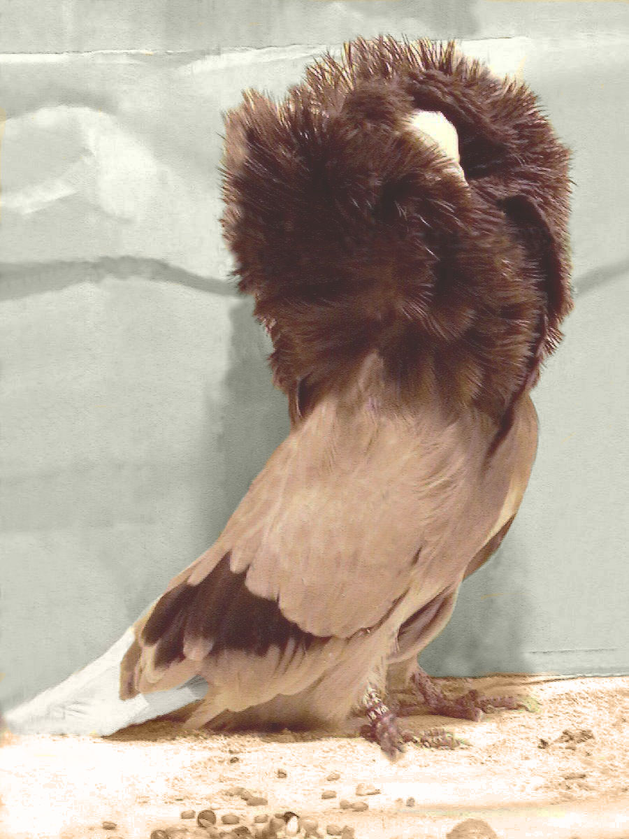 Jacobin Pigeon